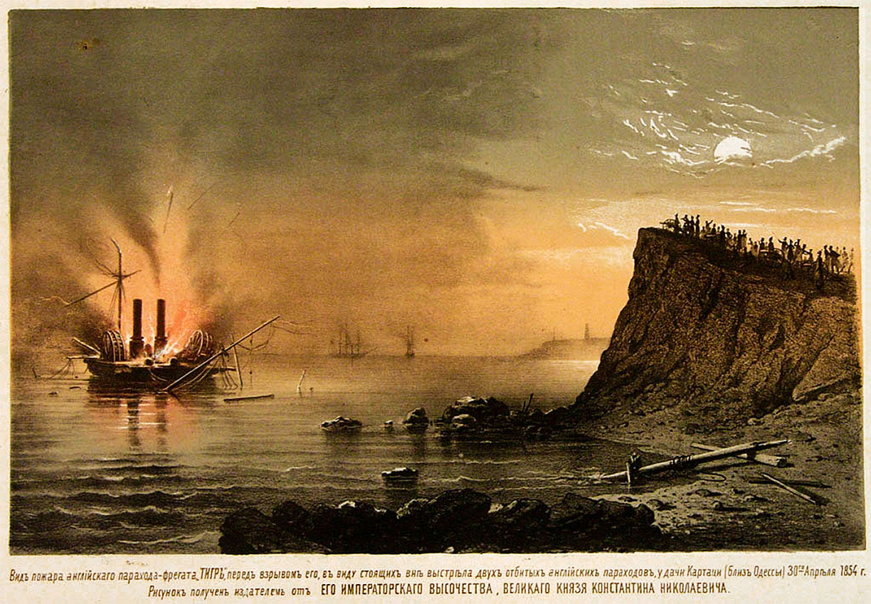 Взрыв английского парахода Тигр на рейде Одессы 1854 год